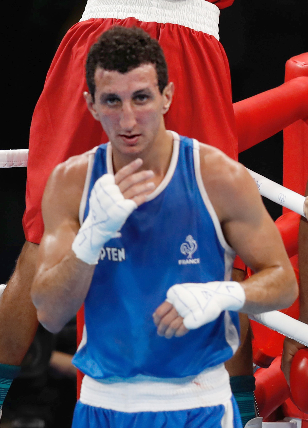 Rio de Janeiro - Por decisão unânime dos juízes, o lutador brasileiro Robson Conceição derrotou o francês Sofiane Oumiha e garantiu o ouro na categoria peso ligeiro, até 60 quilos (Fernando Frazão/Agência Brasil)